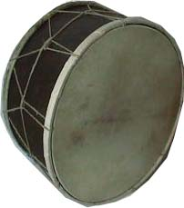 Tapan (eigen verzameling)